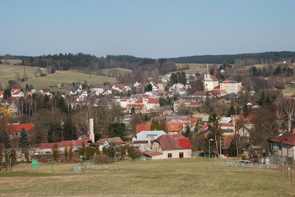 Pohled na Trhovou Kamenici ze sjezdovky